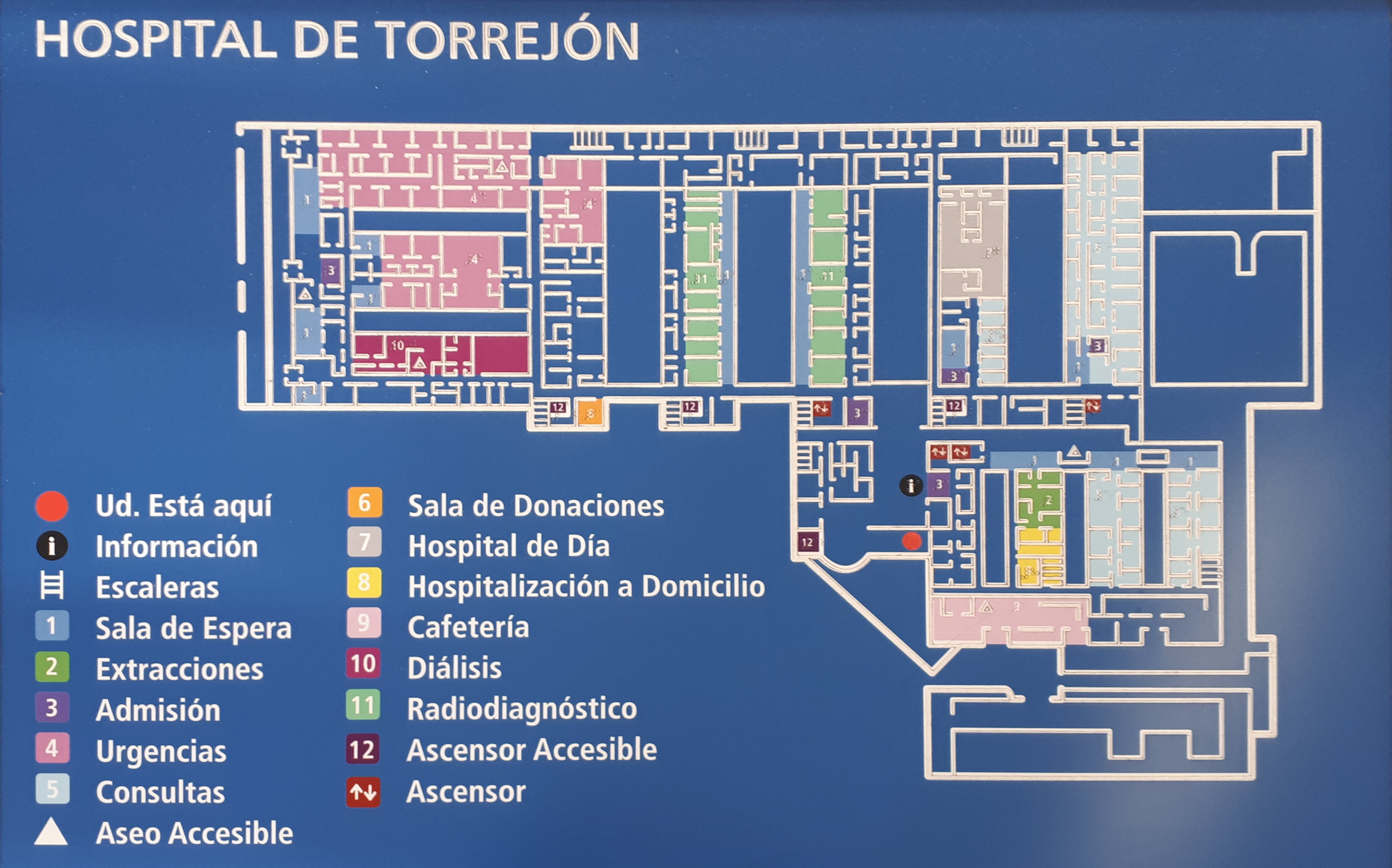 Plano general de las instalaciones del Hospital de Torrejón de Ardoz (Comunidad de Madrid - España). Inaugurado el 21 de septiembre de 2011.